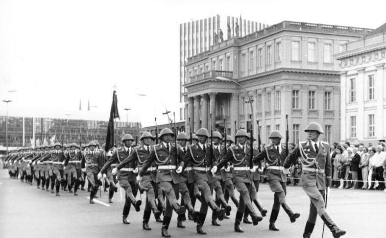 ADN-ZB/Settnik/8.5.85 Berlin: 40. Jahrestag der Befreiung Der Große Wachaufzug der NVA fand anläßlich der Feierlichkeiten zum 40. Jahrestag des Sieges und der Befreiung Unter den Linden statt. Eine Ehrenkompanie des Wachregiments der NVA, das Stabsmusikkorps und der Spielmannszug der Stadtkommandantur Berlin waren aufmarschiert.